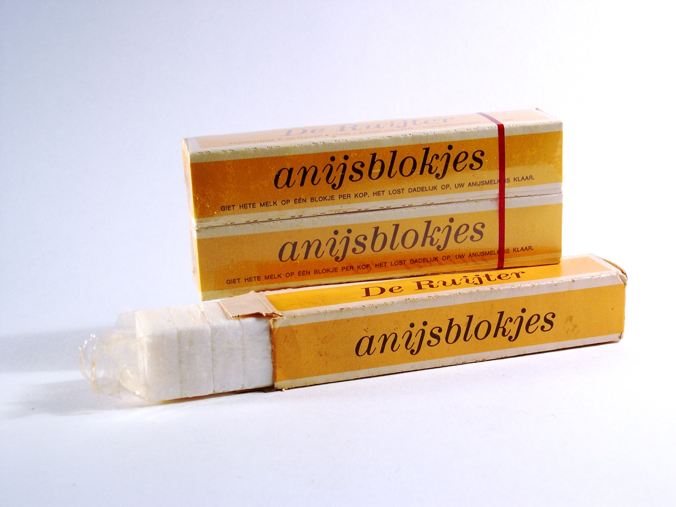 giet hete melk op een blokje per kop ,het lost dadelijk op, uw anijsmelk is klaar